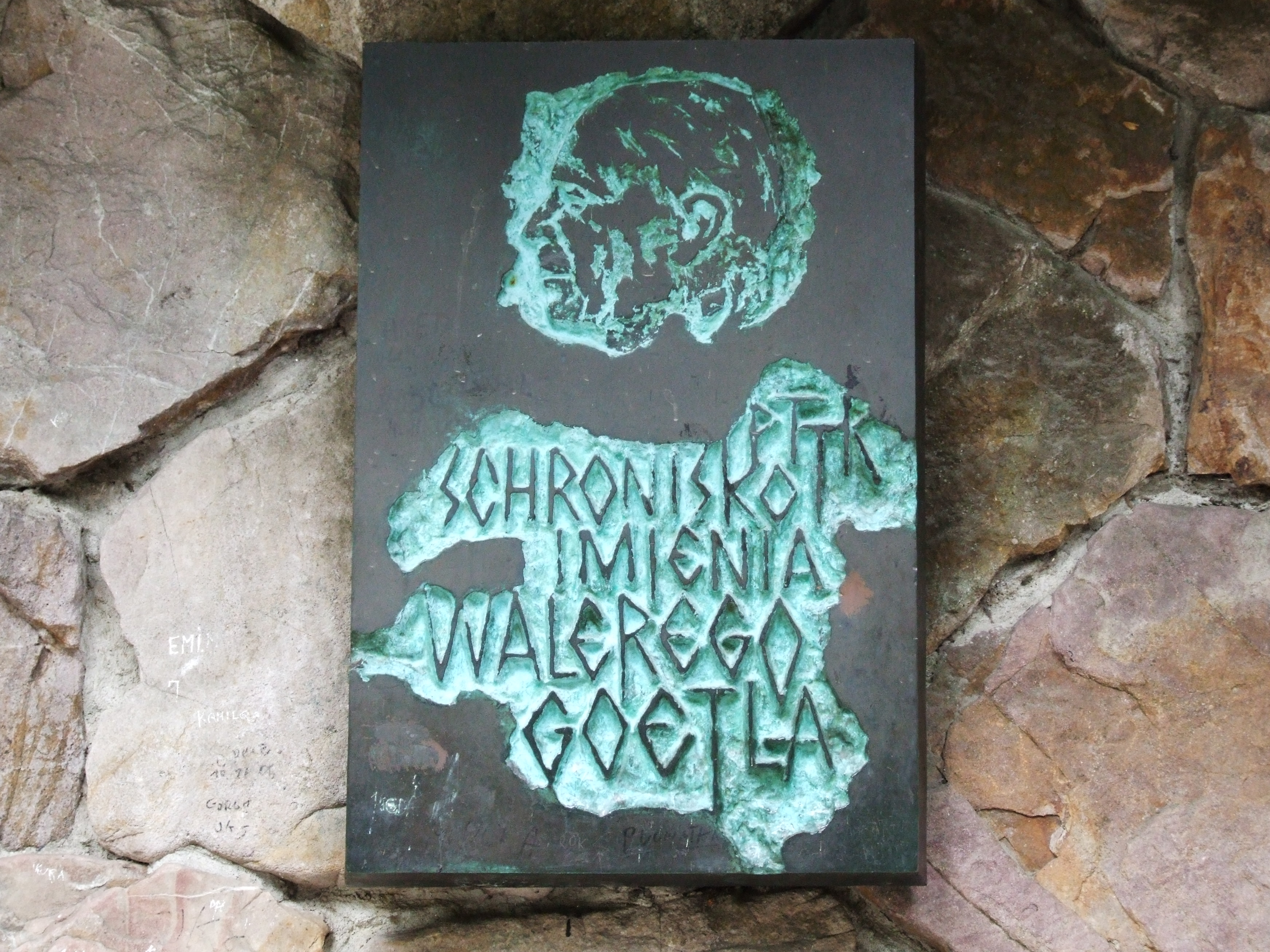 Schronisko na Małej Polance Ornaczańskiej (Hali Ornak) w Dolinie Kościeliskiej; widok na tablicę z imieniem patrona